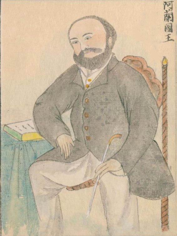 ウィレム3世 (オランダ王) 高嶋祐啓『欧西行紀』